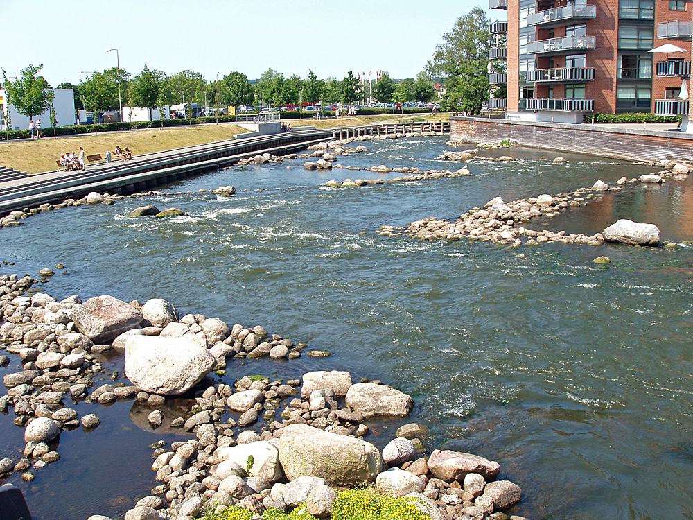 Det nybyggede stryg på Gudenåen ved den tidligere Silkeborg Papirfabrik